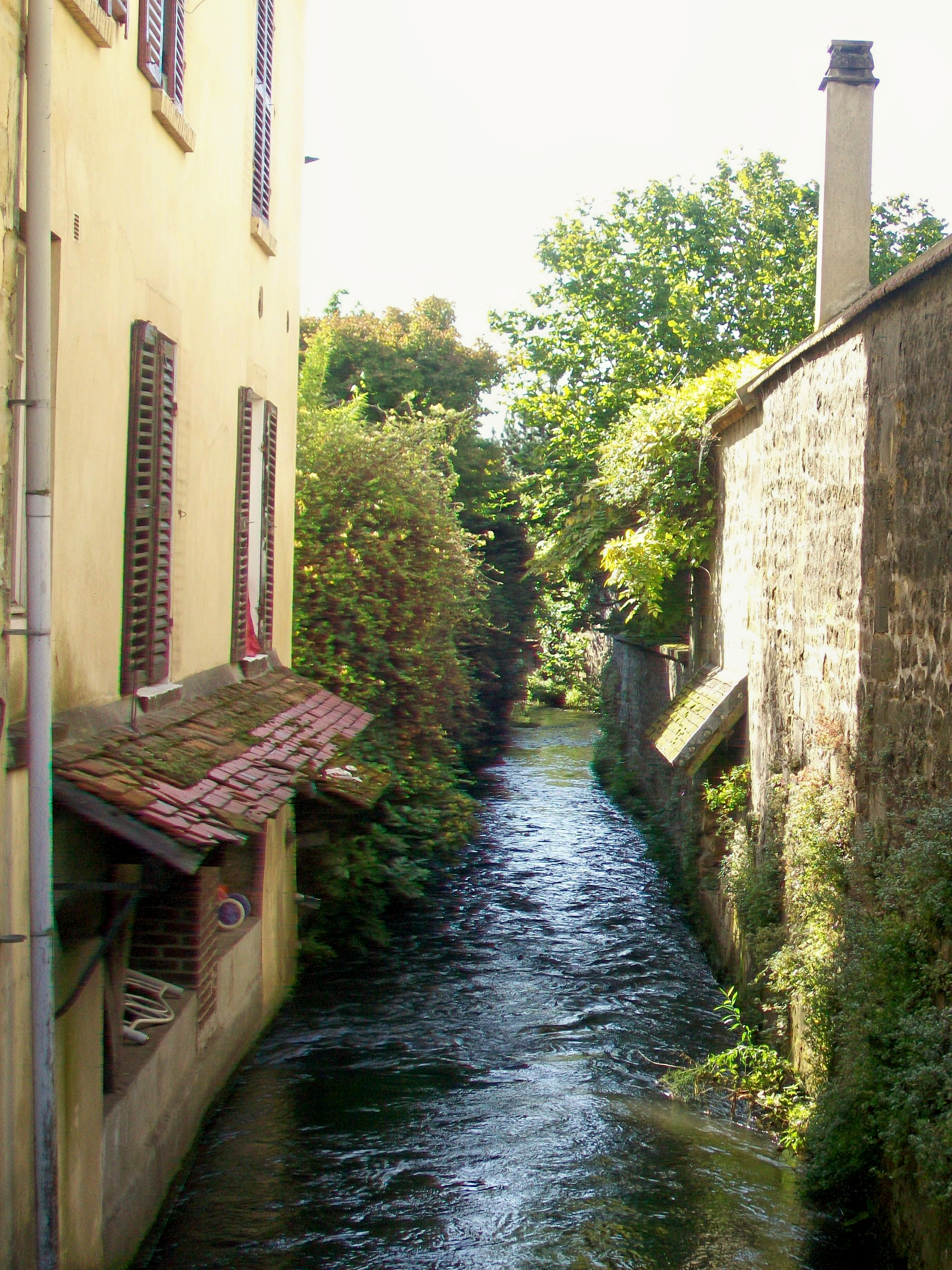 La dérivation de la Viosne près de la rue de Rouen. Plusieurs maisons comportent des lavoirs, intégrés dans la façade.